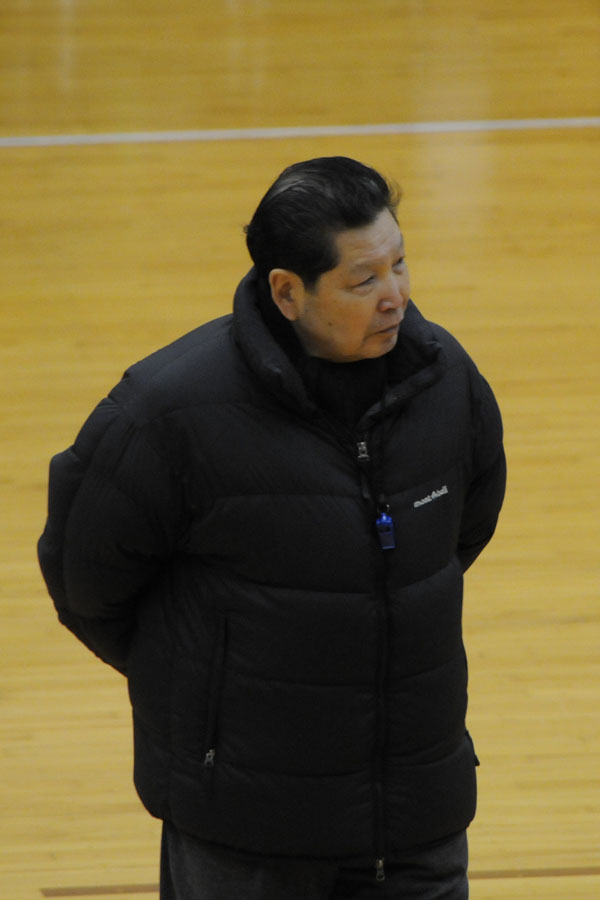 秋田銀行、笠原成元ヘッドコーチ。広域五城目体育館で。